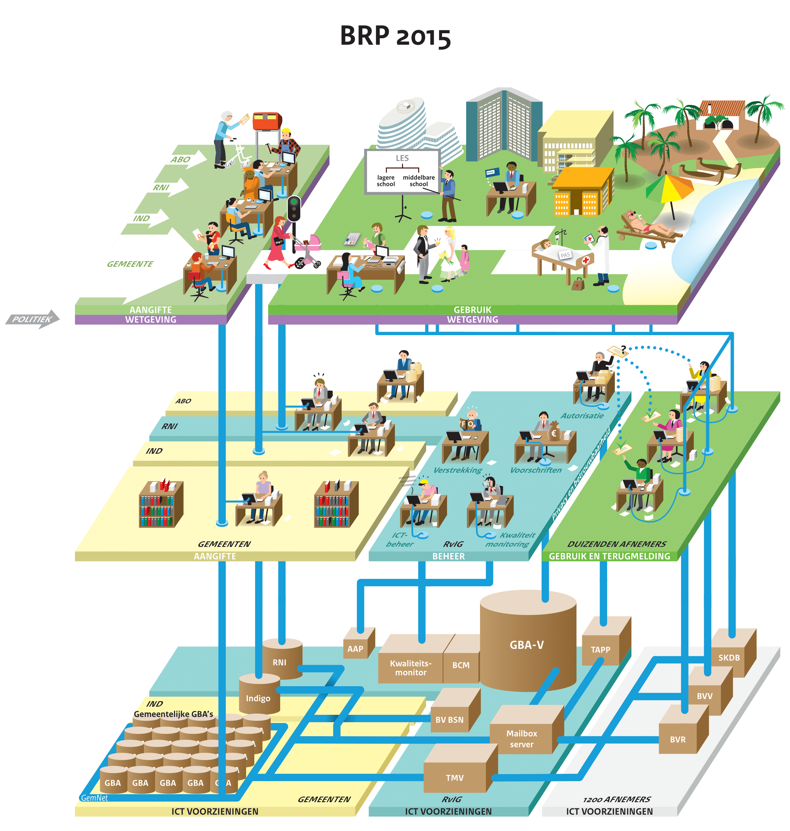 Stelselplaat Basisregistratie Personen (BRP) Geconverteerd van het originele bestand Functioneel+beheer+Def.+versie+stelselplaat+BRP.pdf naar een png bestandsformaat.